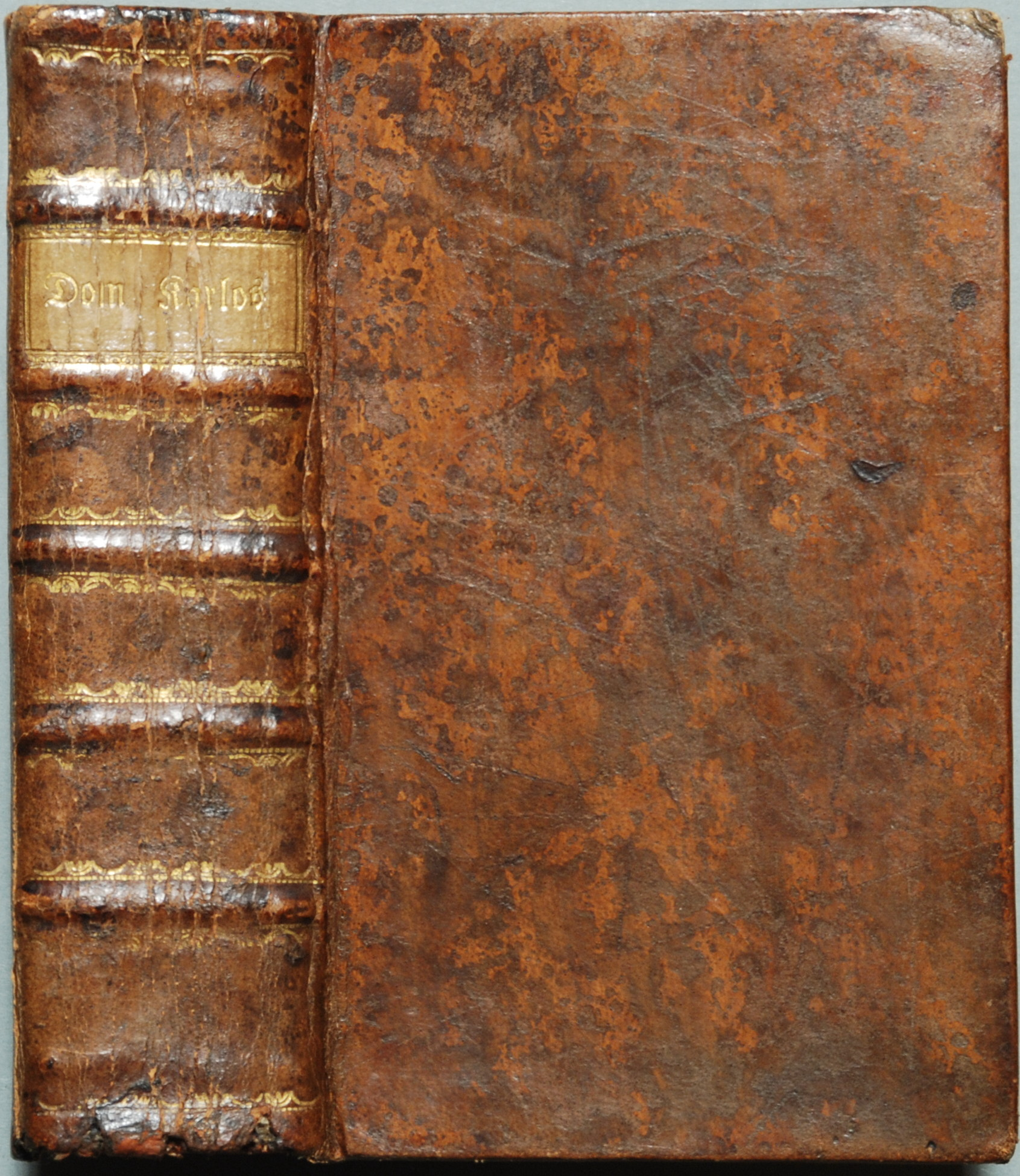 Friedrich Schiller: Don Karlos. Zeitgenössischer Einband (Ganzleder, 16 x 10 cm) mit Rückenschild und Rückenvergoldung